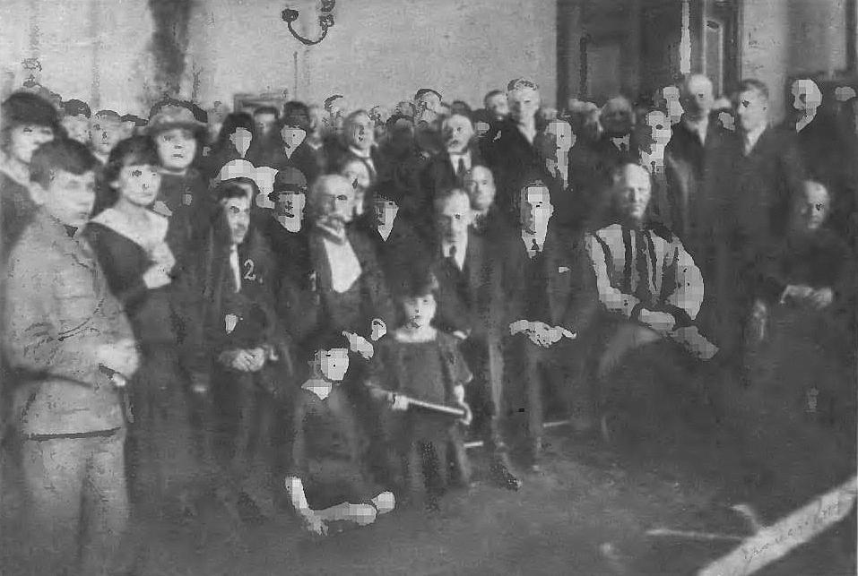 Uroczystość dekoracji Krzyżem Komandorskim Orderu Odrodzenia Polski ordynata Tadeusza Czarkowskiego-Golejewskiego (1) w Borszczowie w 1925. Oznaczony (2) starosta borszczowski Józef Piotrowski.